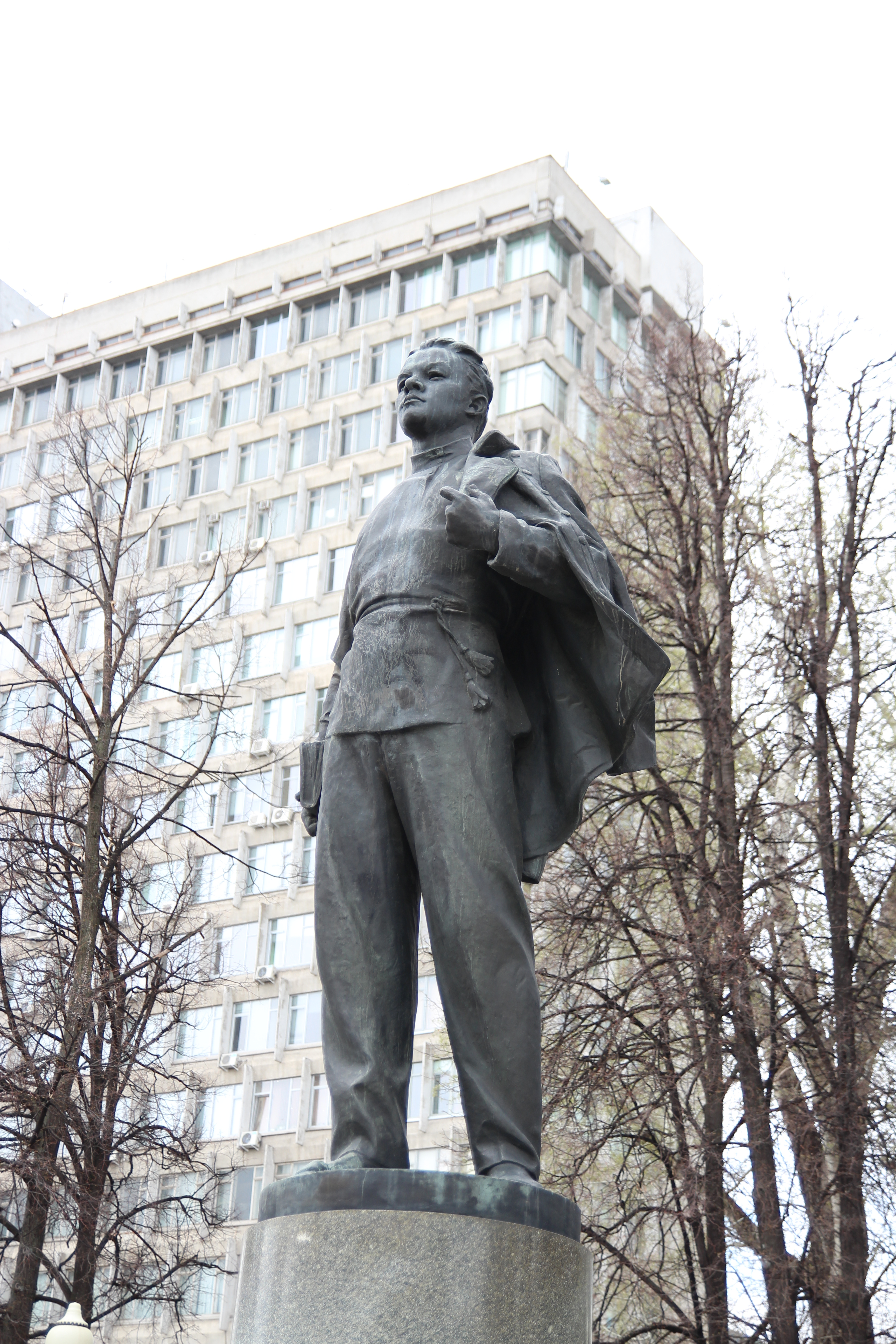 Памятник Володе Ульянову - студенту (Ленину): улица Кремлевская, 18 (против здания Университета), Казань, Татарстан